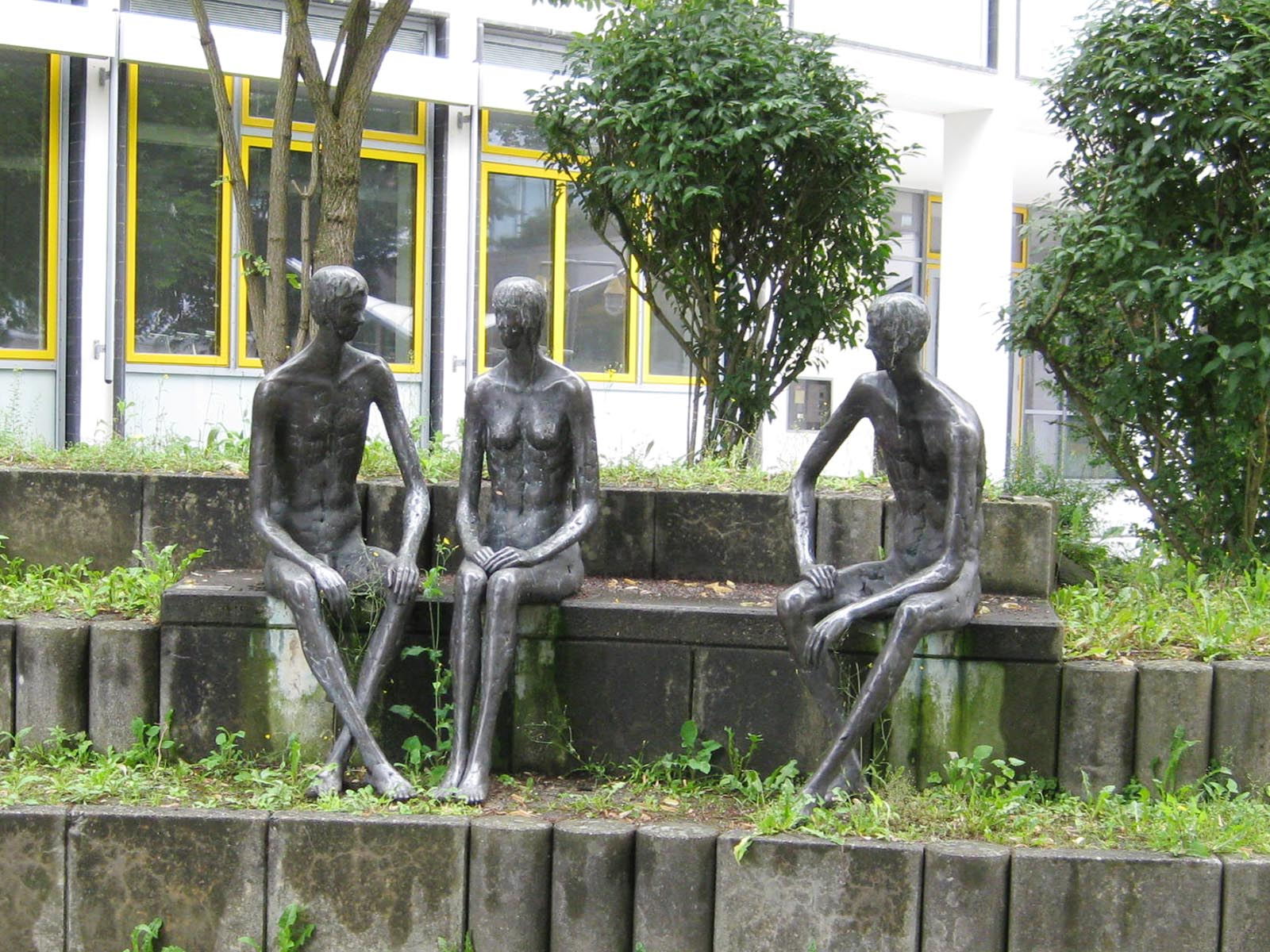 Roland Martin, Drei Sitzende, 1981, - Deutschland, Baden-Württemberg, Tuttlingen, Schulzentrum Mühlau